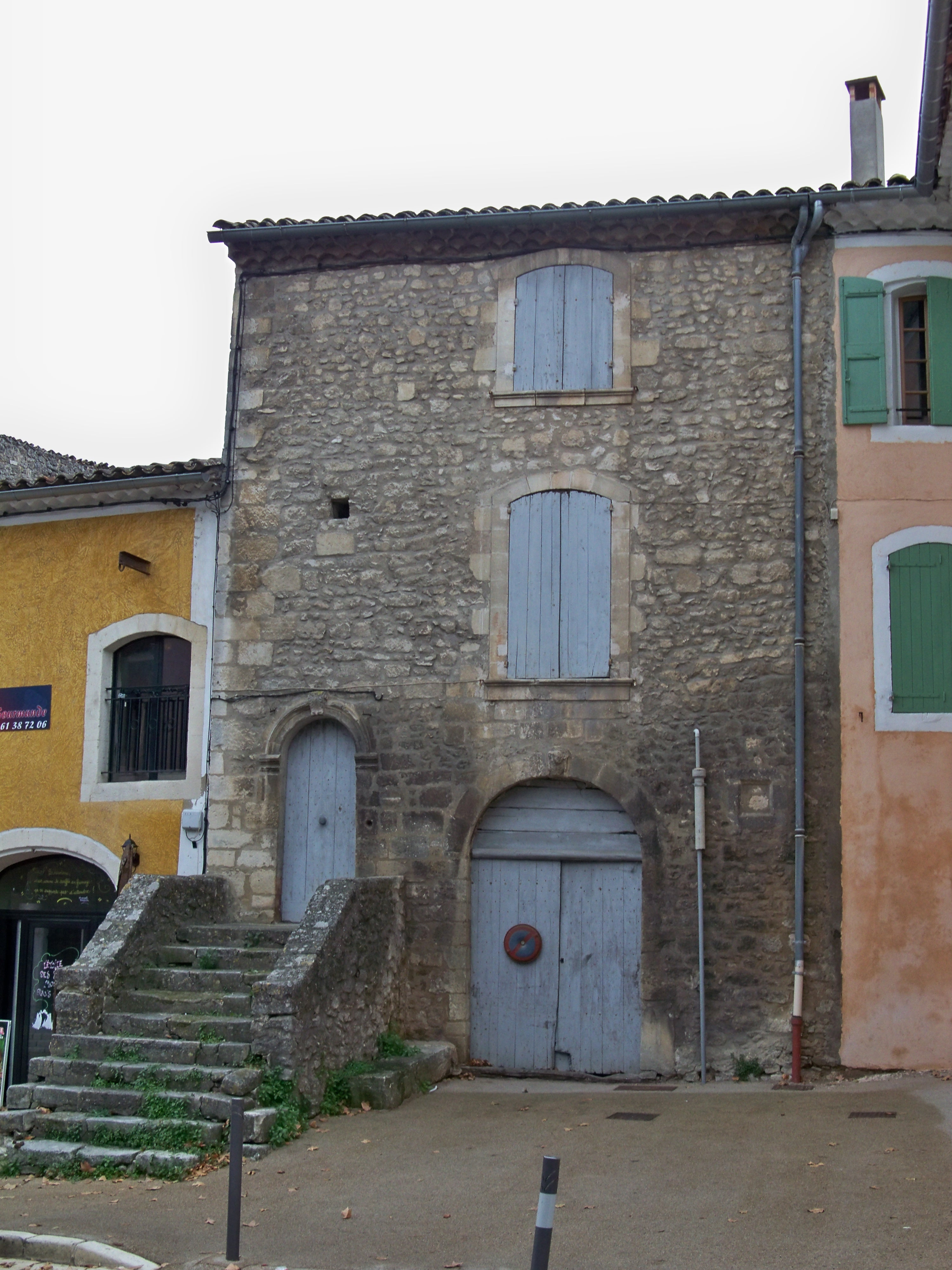 Maison à Céreste, Alpes de Haute Provence, France